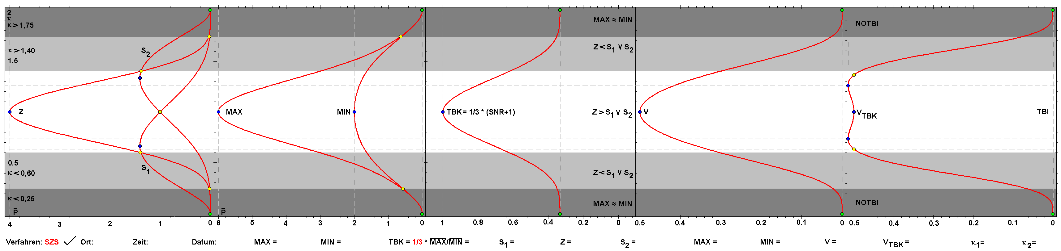 Formblatt für die grafische Anwendung des Time-Bin-Kriteriums Methode SZS